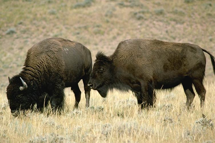 Großes Bild zweier grasender Büffel